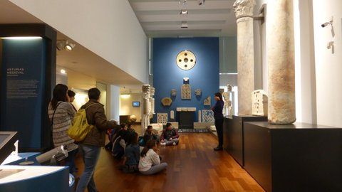 Visita guiada a la sala dedicada al arte medieval en el Museo Arqueológico de Asturias.